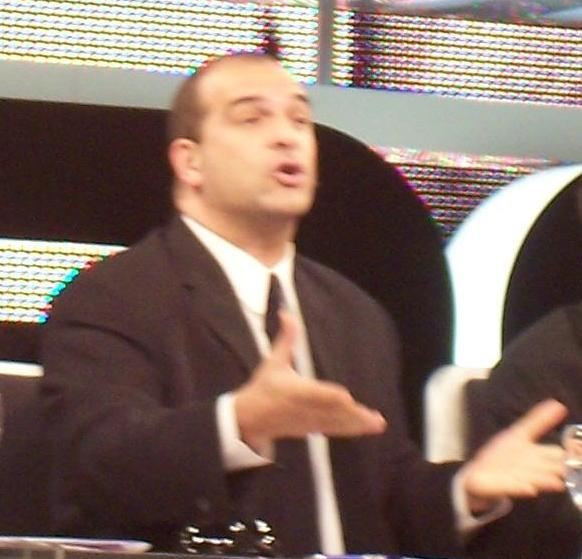 Nacho Goano, el comentarista deportivo de Caiga Quien Caiga (Telefé-Argentina)